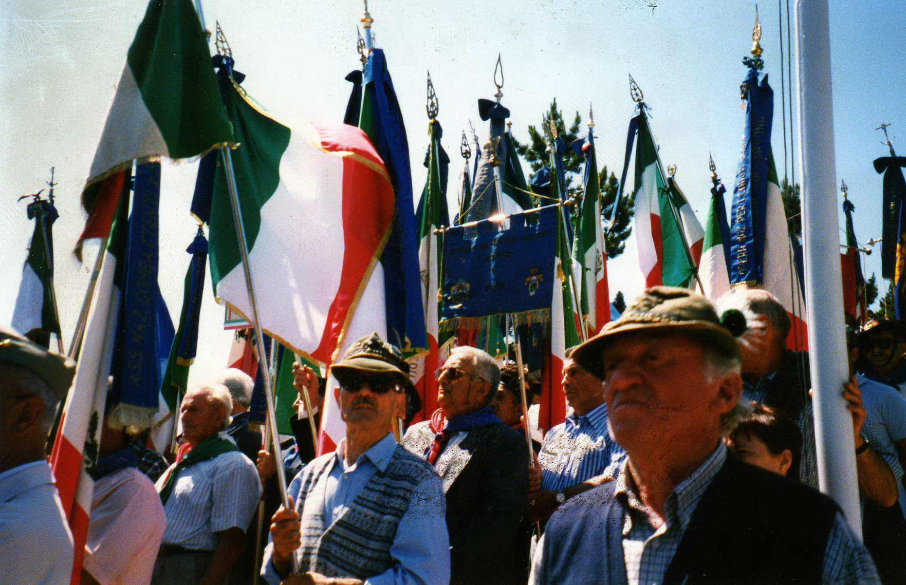 Sacrario Mauriziano